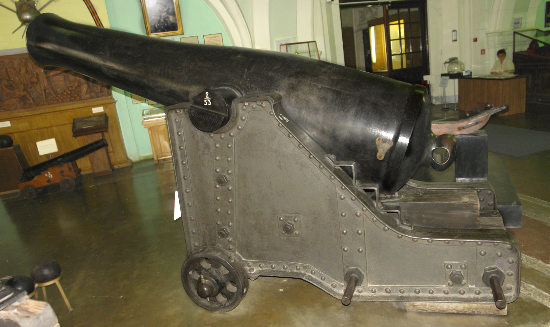 60-фунтовая (197-мм) крепостная пушка образца 1857 года. Чугун. Длина 348 см. Масса 6.2т. Отлита на шведском заводе "Финслонг" в 1857. по проекту Н.В. Маиевского. Первая попытка применения результатов научных исследований измерения величины давления пороховых газов для рассчёта толщины стенок ствола. Лафет береловой казематной системы генерал-майора Адрееева образца 1863г. Военно-исторический музей артиллерии, инженерных войск и войск связи, Санкт-Петербург.